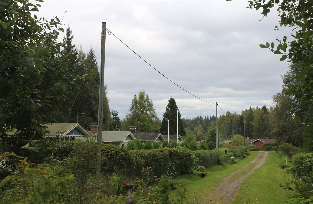 Kolmisopen ryhmäpuutarha-alueen mökkipalstoja mökkeineen Kuopion Kolmisopen kaupunginosassa.